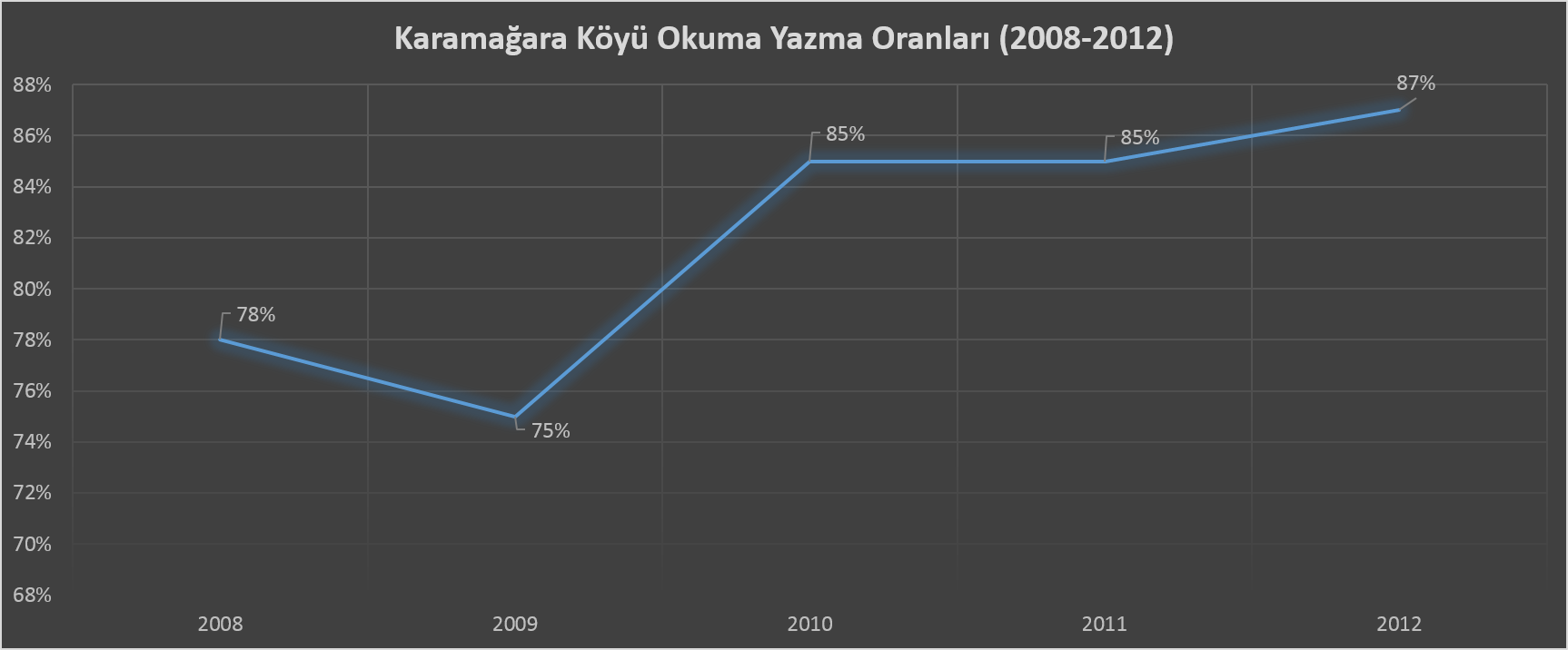 Kahramanmaraş ili Elbistan ilçesi Karamağara köyüne dair istatistik.